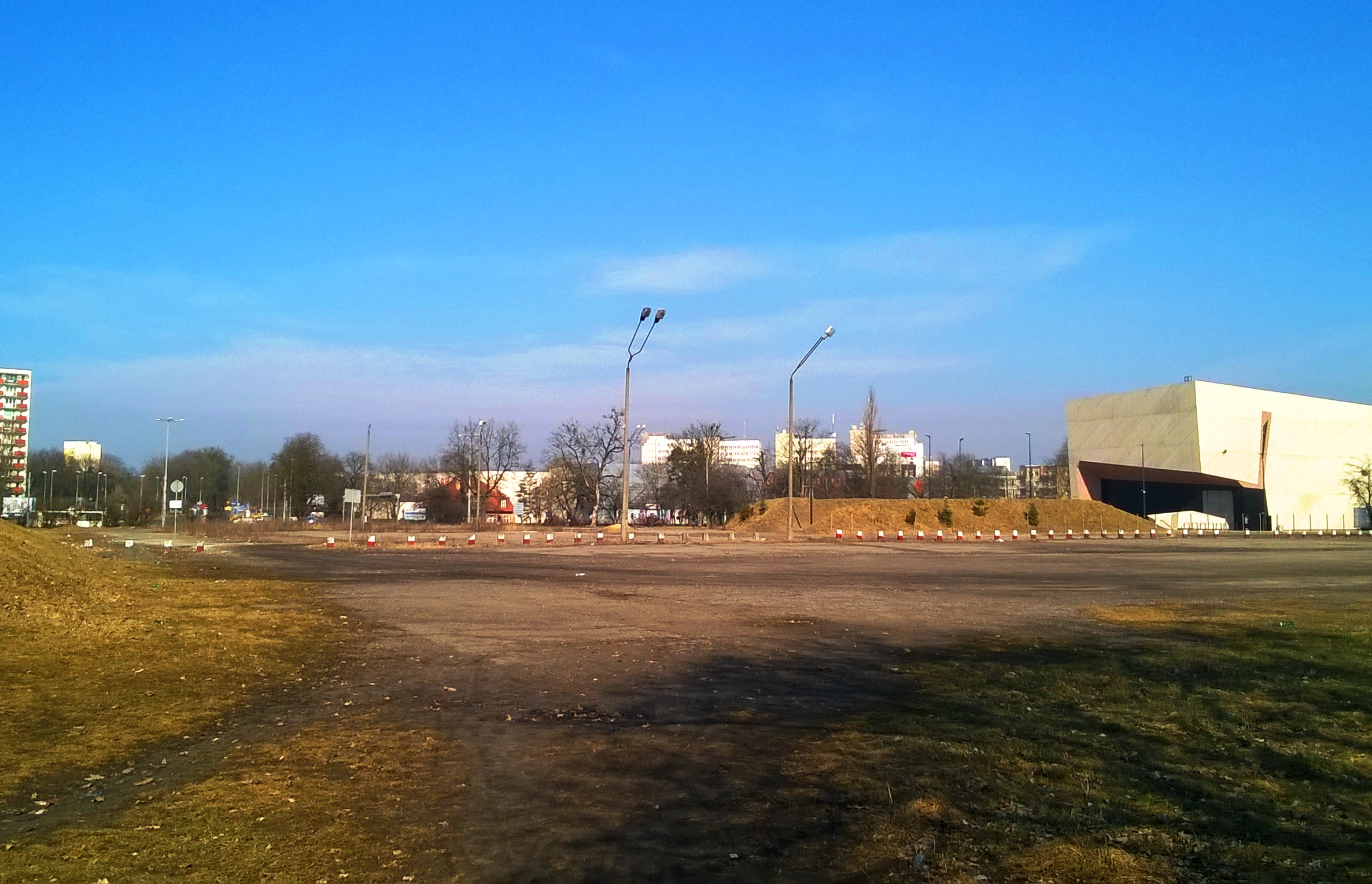 Toruń